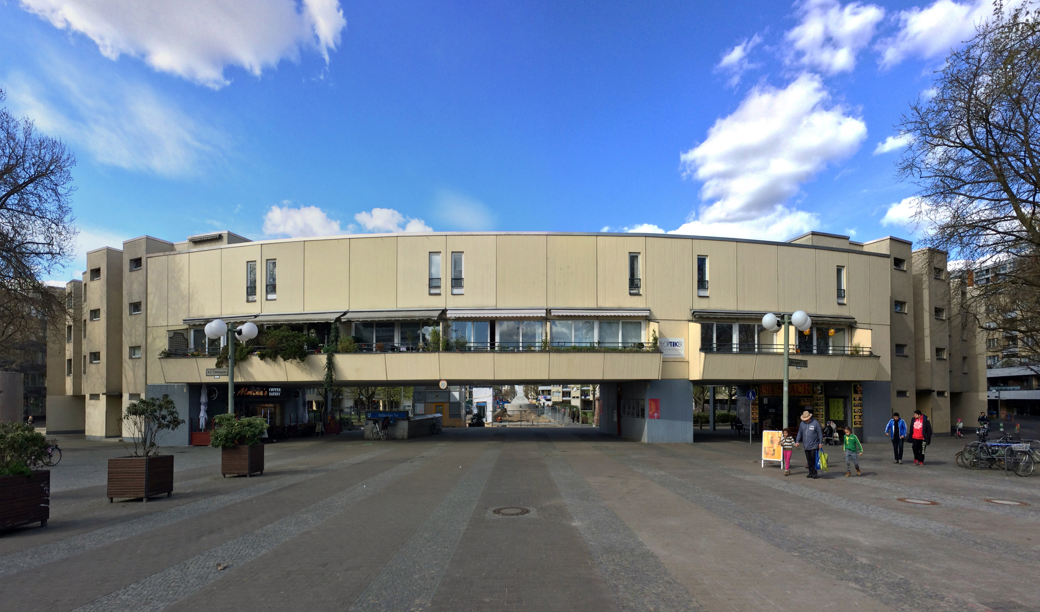 Wohnquartier um den Mehringplatz, Lindenstraße, Friedrichstraße, Hallesches Ufer, Berlin-Kreuzberg • Städtebaulicher Entwurf 1962/63–1966, Hans Scharoun • Gebäudeplanung und -ausführung 1968–1975, Werner Düttmann, Justus Burtin, Eckhard Grassow, Carl-August von Halle, Siegfried Hein, Renate Scheper • Freiraumplanung Walter Rossow